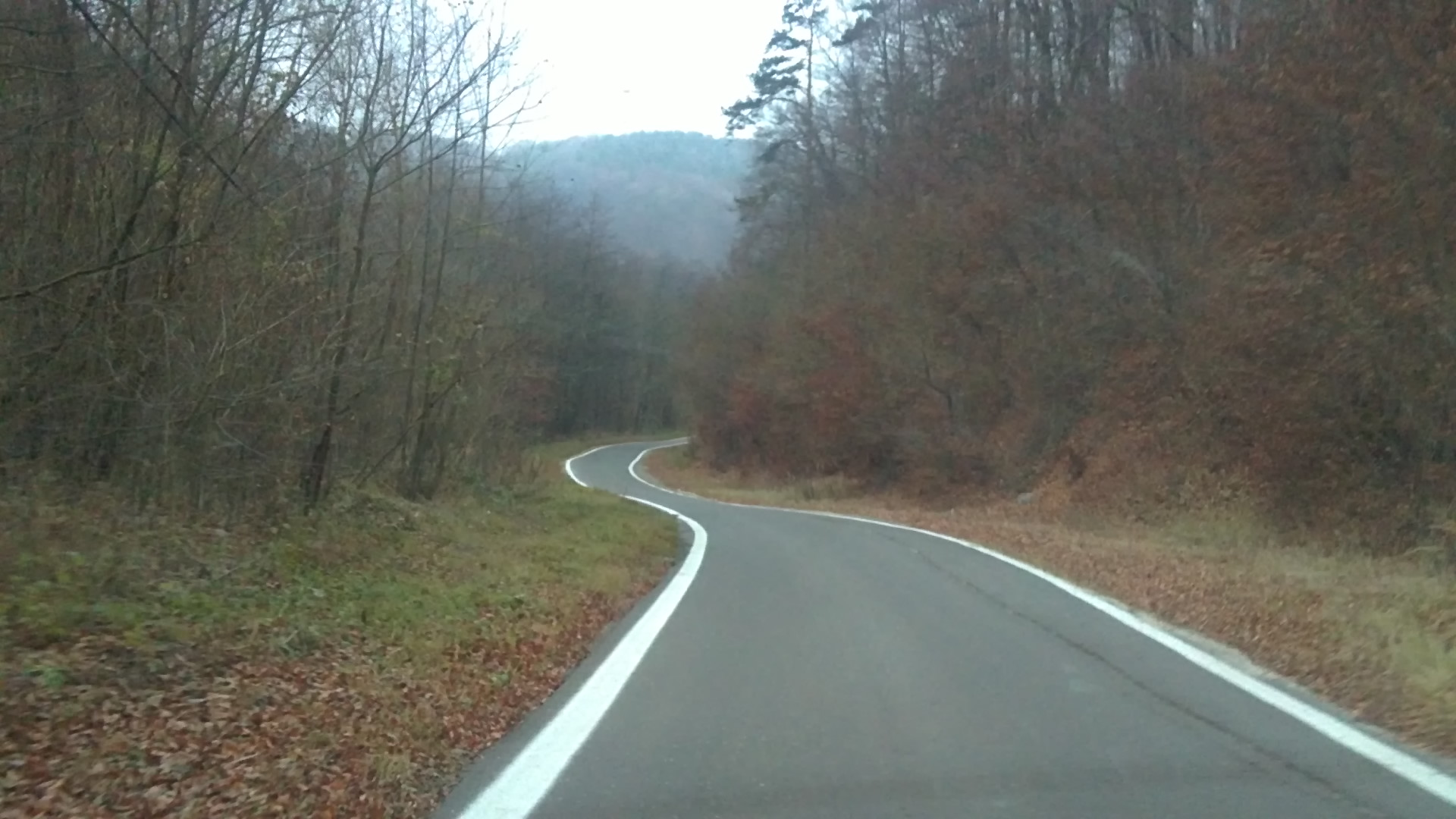 Cesta III. triedy 065033 pri Remate